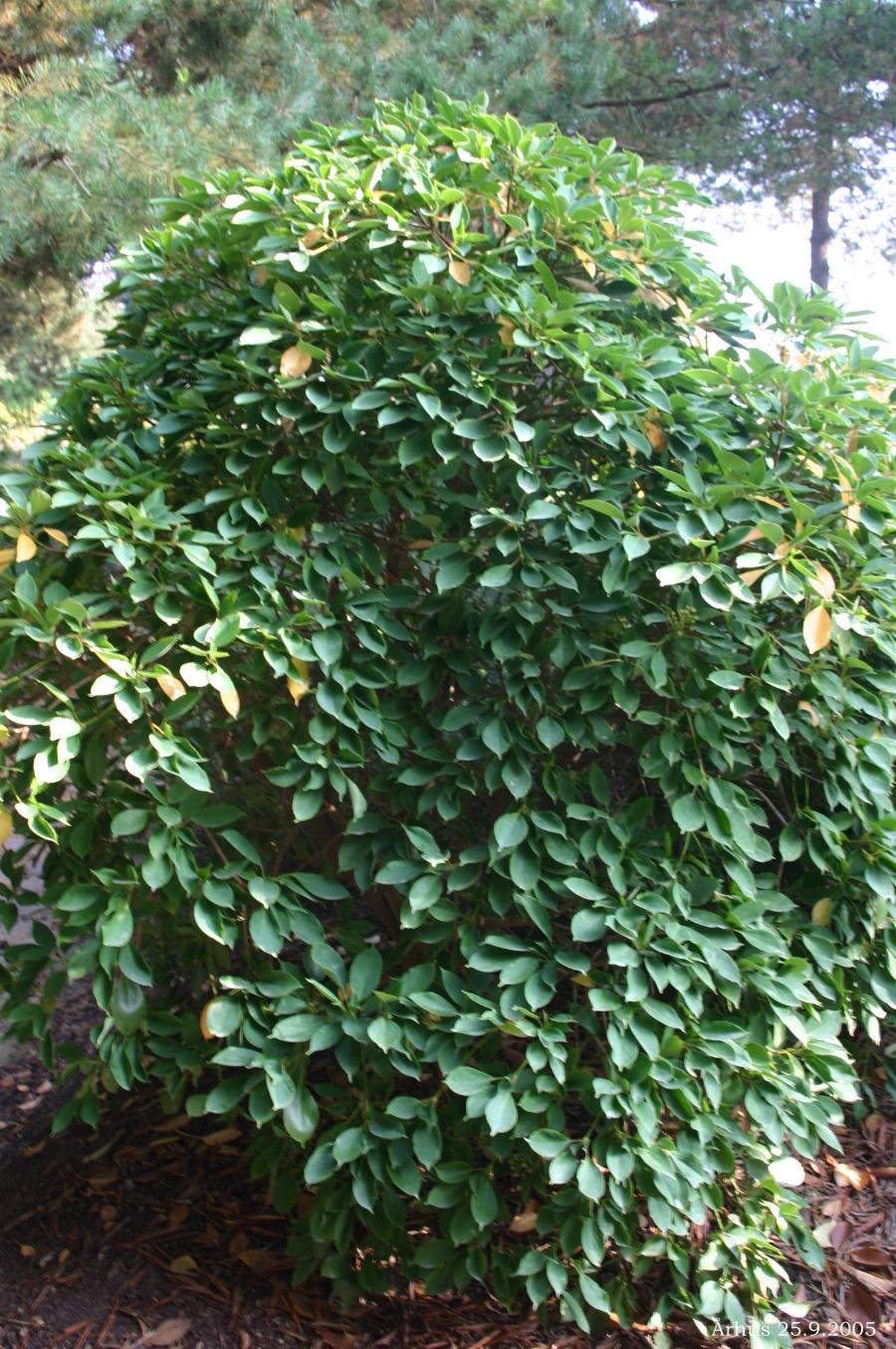 Trochodendron aralioides: Habit